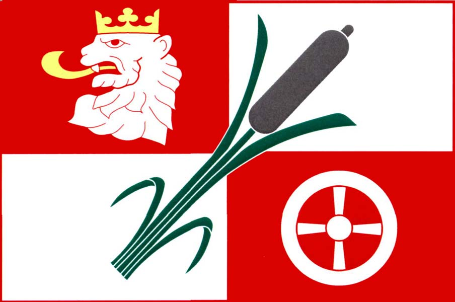 Vlajka obce Střítež (okres Jihlava)